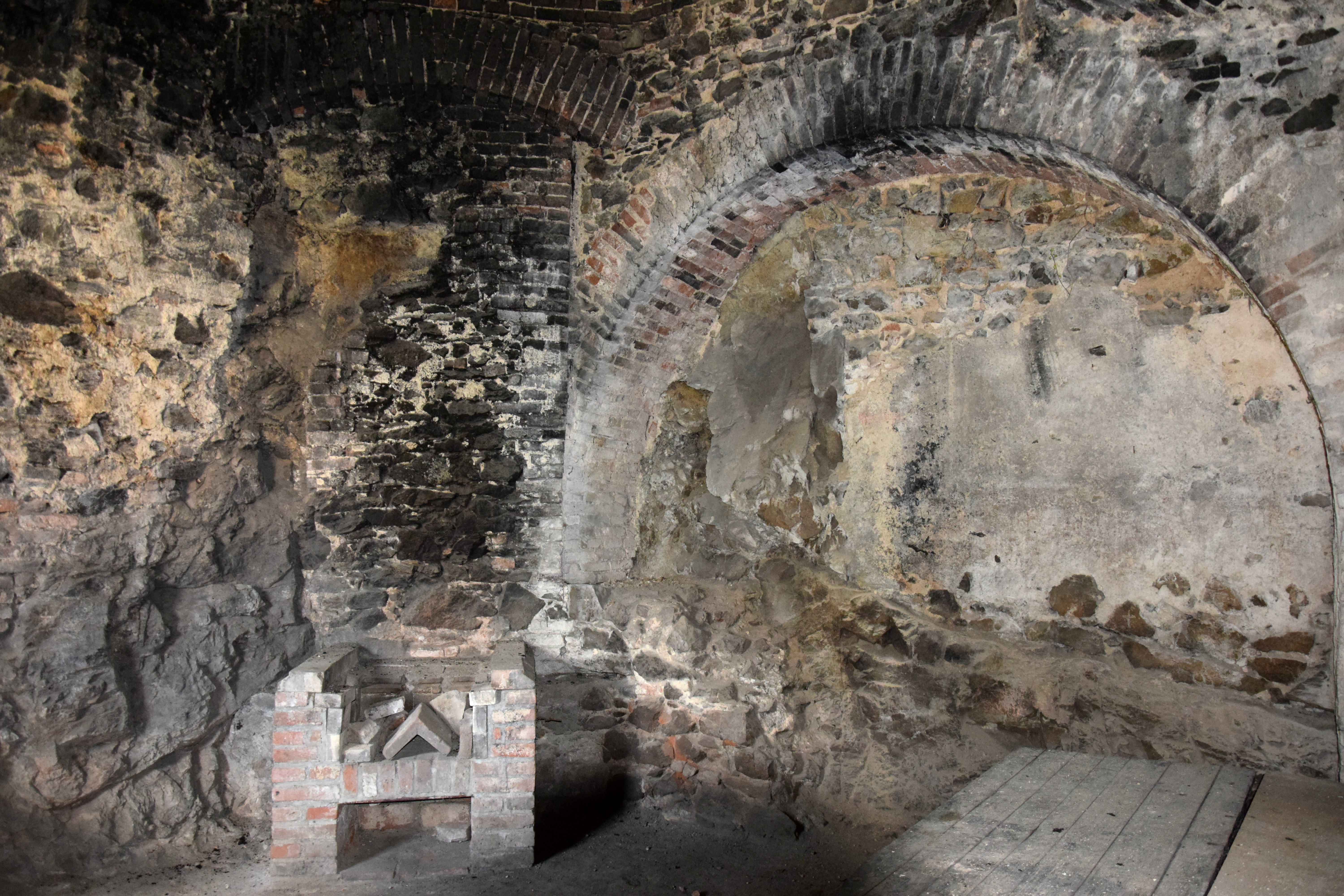 Roupov – kuchyně